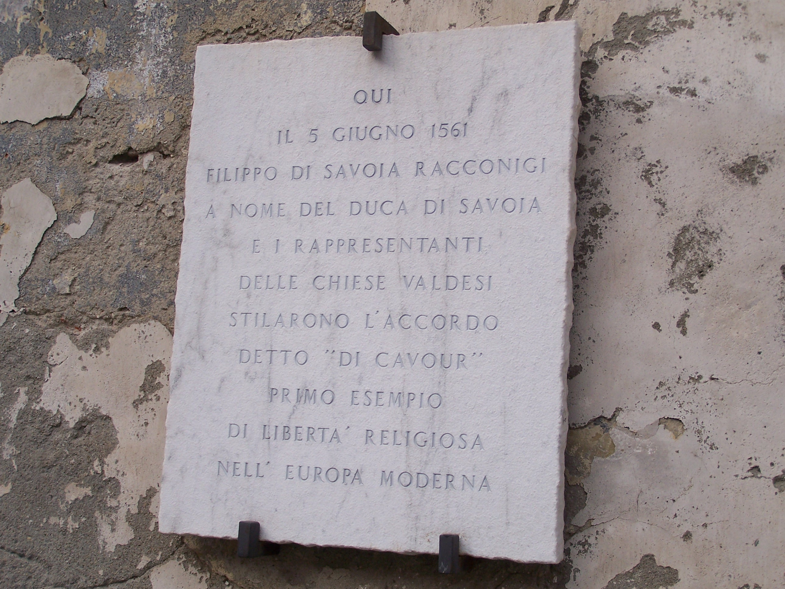 Carlo Perassi, Epigrafe, Casaforte degli Acaja-Racconigi, Marzo 2007